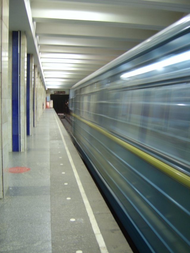 Kiev metro, station Poshtova Ploscha (Pochtovaya Ploshchad) Київ (Киев), ст. м. Поштова площа (Почтовая Площадь)